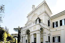 Villa Heritz - Sede Viale Romania